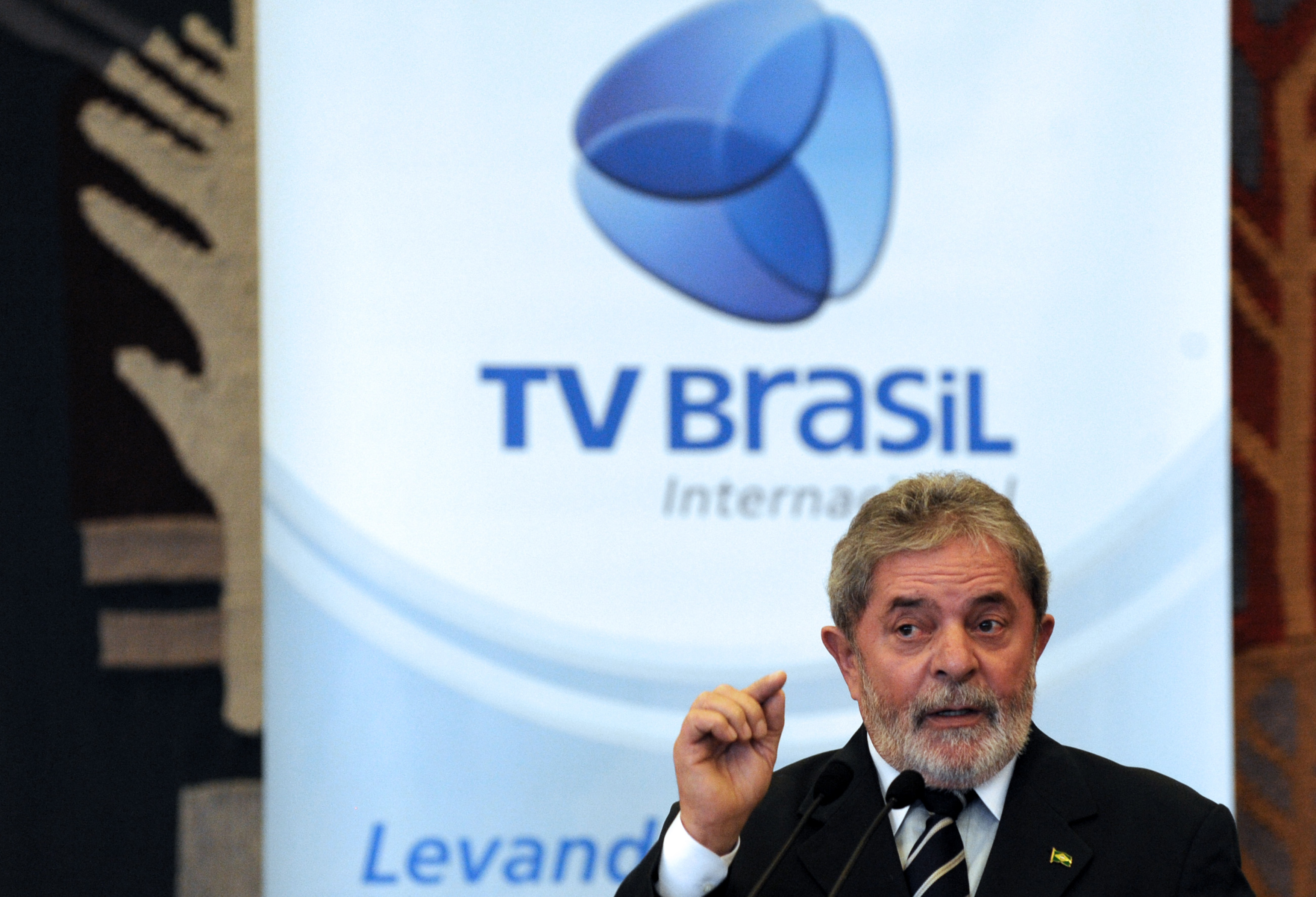 O presidente Luiz Inácio Lula da Silva no lançamento da TV Brasil Internacional.